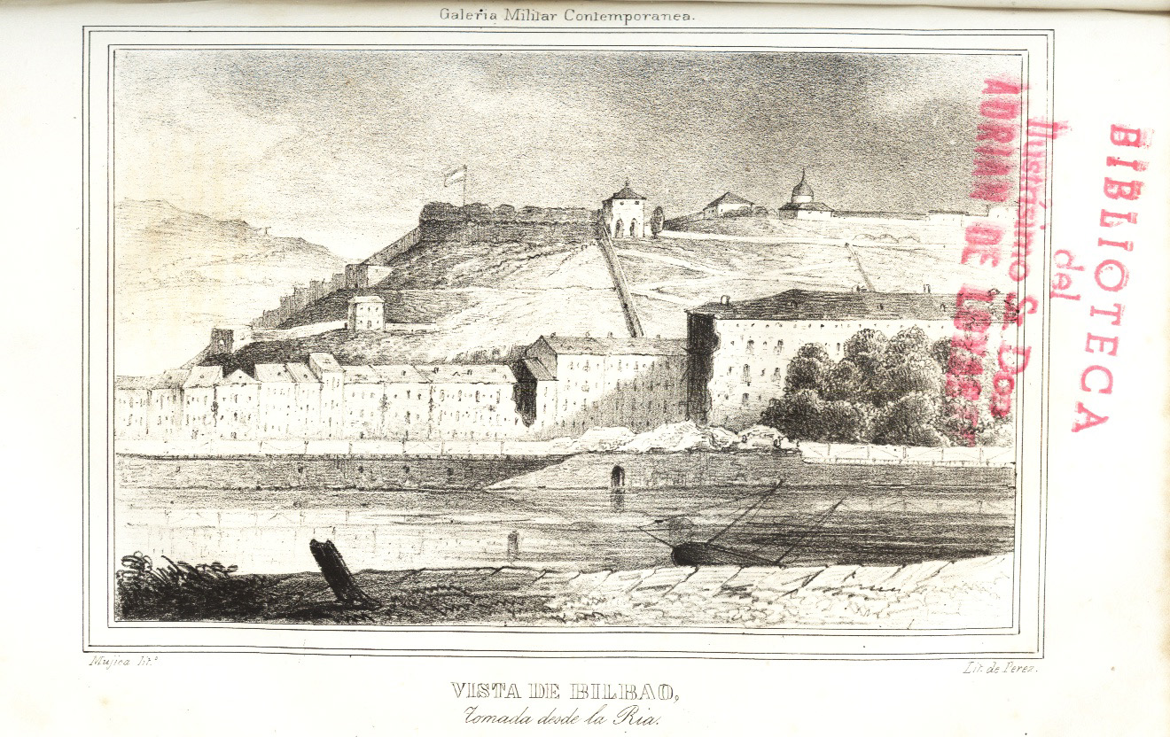 Vista de Bilbao desde la ría. "Galería Militar Contemporánea". Madrid 1846.